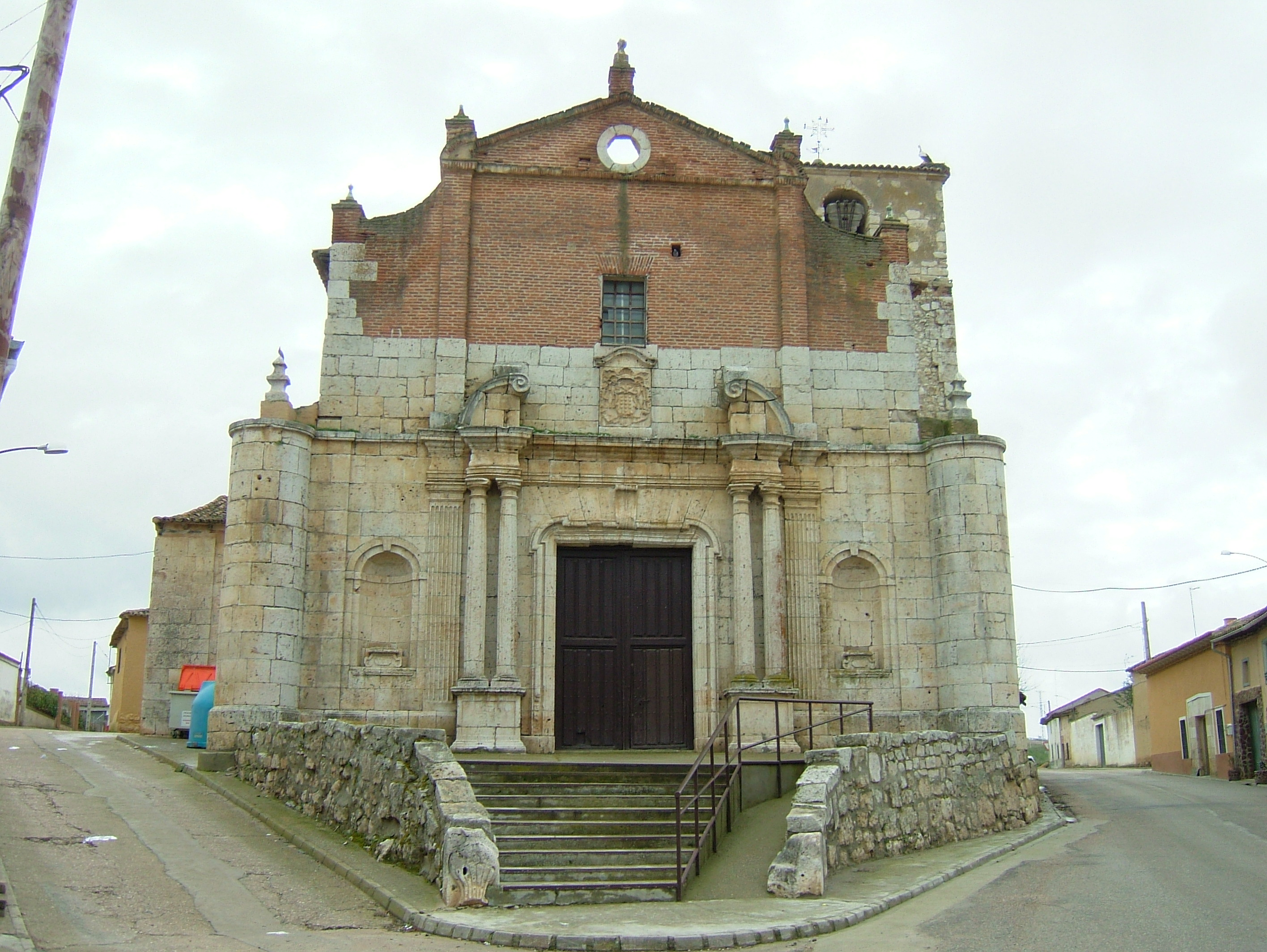 Fotografía tomada al medio día, con buena luz, de la fachada del templo parroquial de San Miguel Arcángel de Vega de Valdetronco, provincia de Valladolid, España.